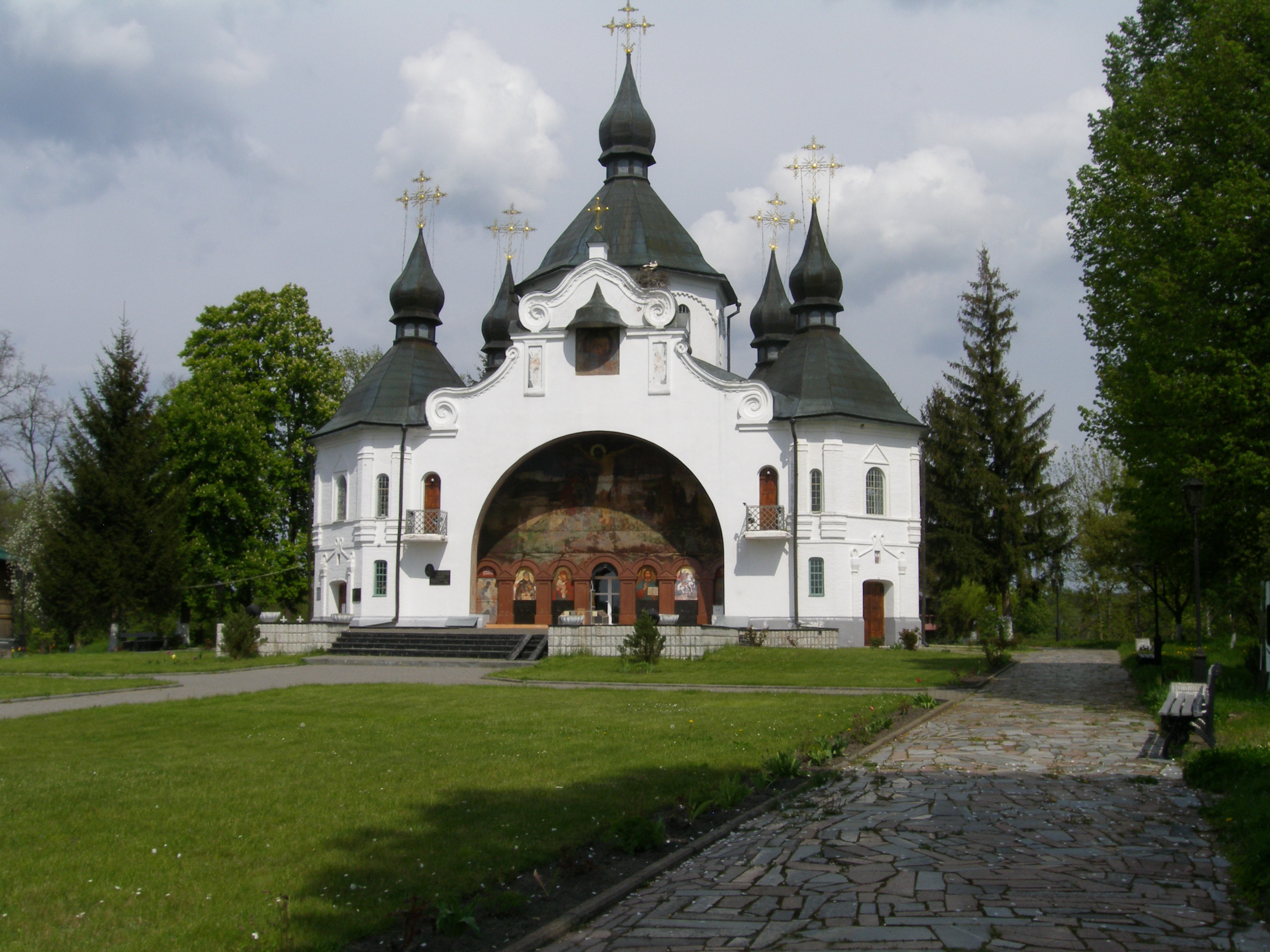 Козацькі могили, Радивилівський район с. Пляшева